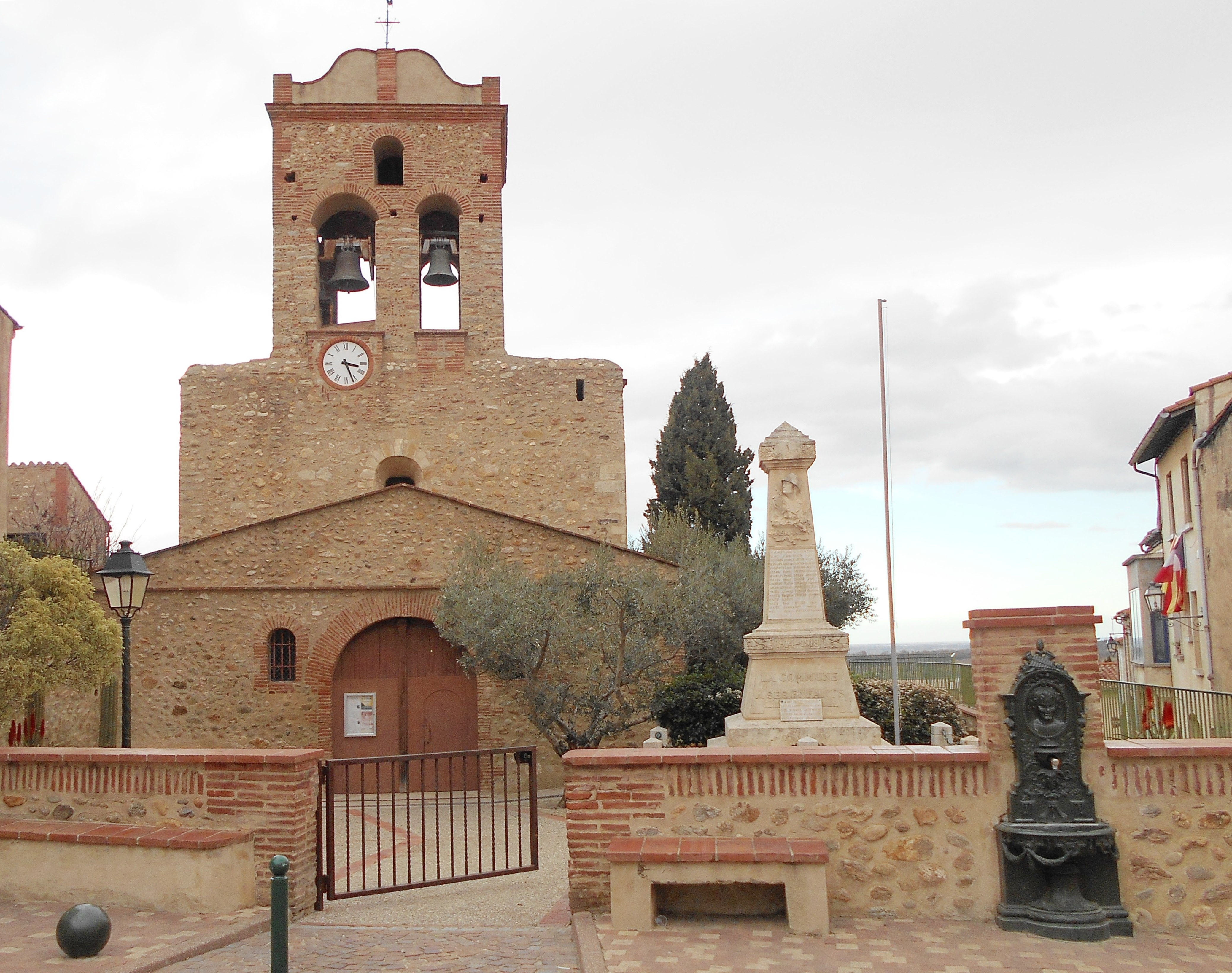 L'església parroquial de Sant Andreu de Banyuls dels Aspres. Façana principal